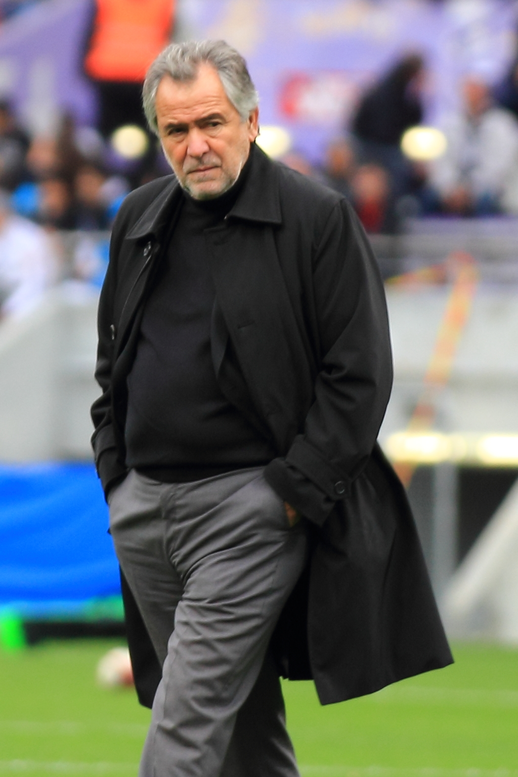 Stade toulousain contre l'USAP - Avant match